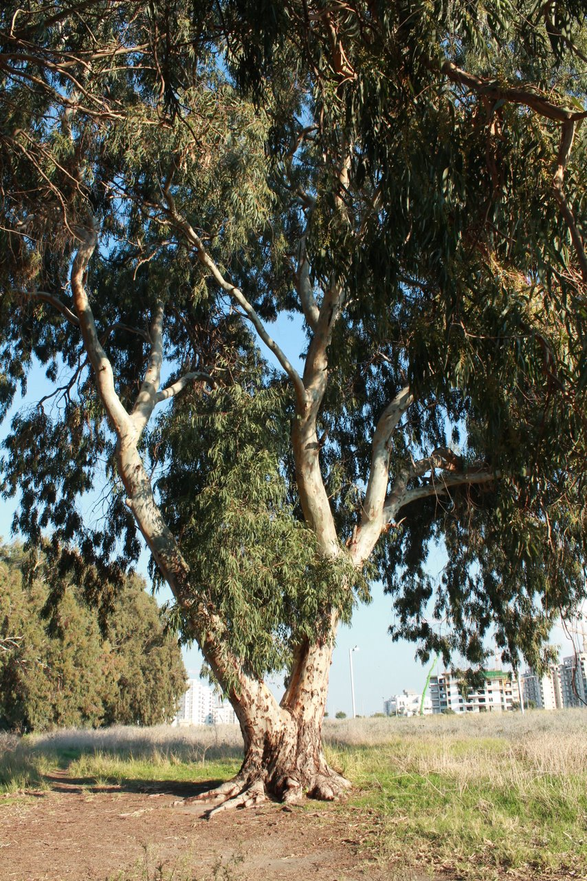 אקליפטוס בפרק שלולית החורף